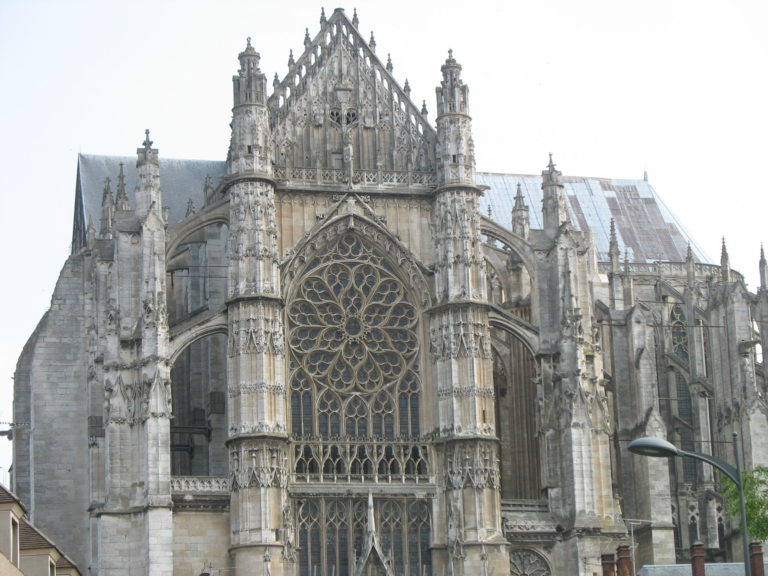 façade sud de la cathédrale de Beauvais